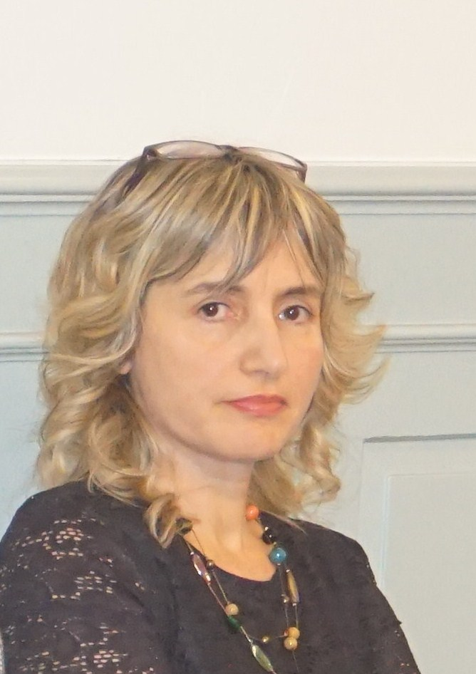 Foto durante la presentazione in Svizzera, 2019